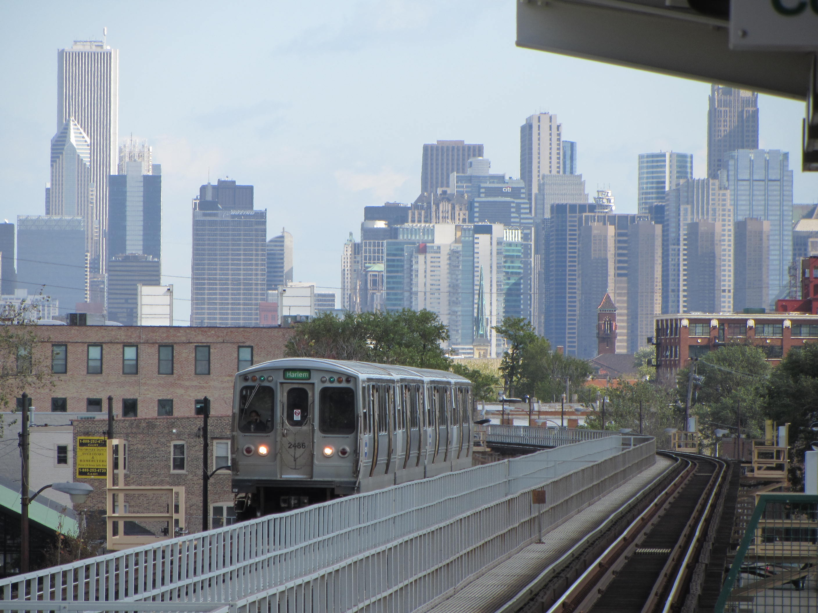 20111014 07 CTA Green Line L @ Kedzie